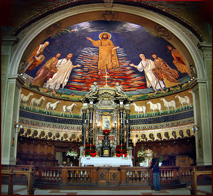 Roma: Mosaico absidale nella chiesa dei Santi Cosma e Damiano (527/530, ma con ampi restauri successivi). All'estrema sinistra, papa Felice IV.